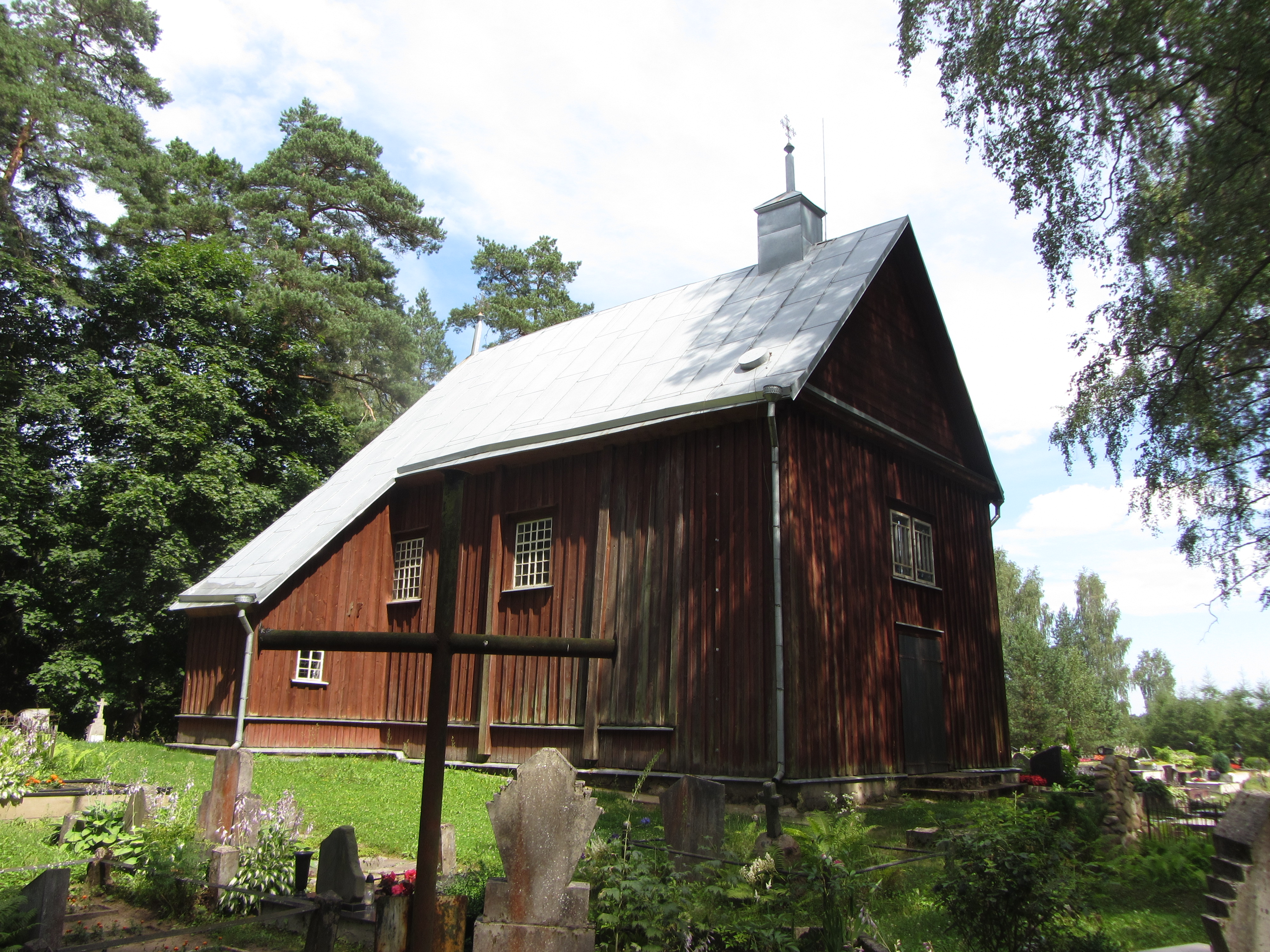 Rudesa, Lithuania